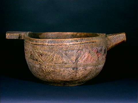 Trøys fra Sauherad i Telemark, datert 1754. Innskrift: "JEG HOLDER MIG BRA UTI GISTBAA..../ ION BIØRN SØN HAVER IORT DENNE TRØS DEN 14 MARTS I ANO 1754". Lengde 62 cm. Norsk Folkemuseum. NF.1906-0444.